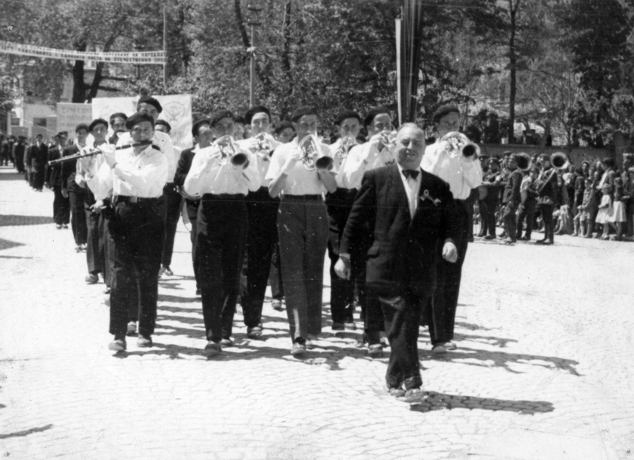 Синът на Димитър Янков Ганев (Ганеолу) - Васил Димитров Ганев като диригент на духовия оркестър на френския колеж „Свети Августи